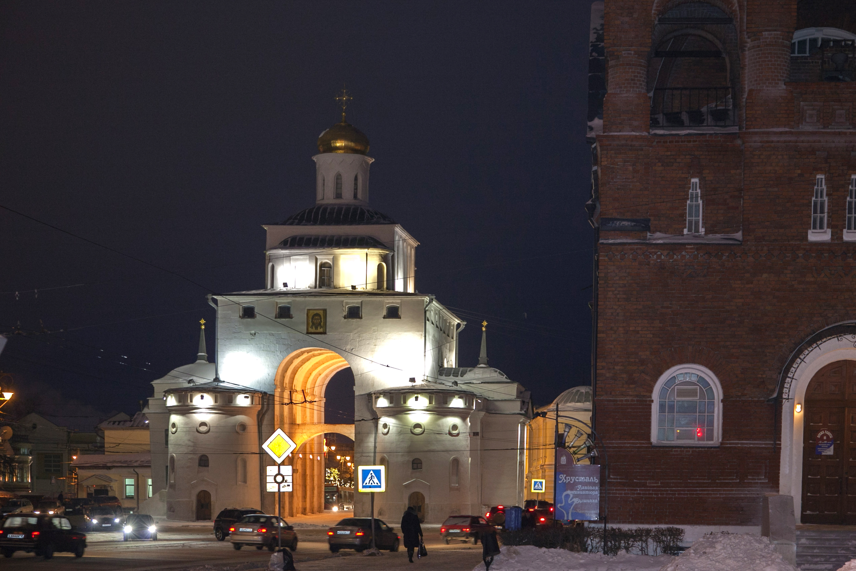 Золотые ворота (Владимирская область, Владимир, 3 интернационала улица)